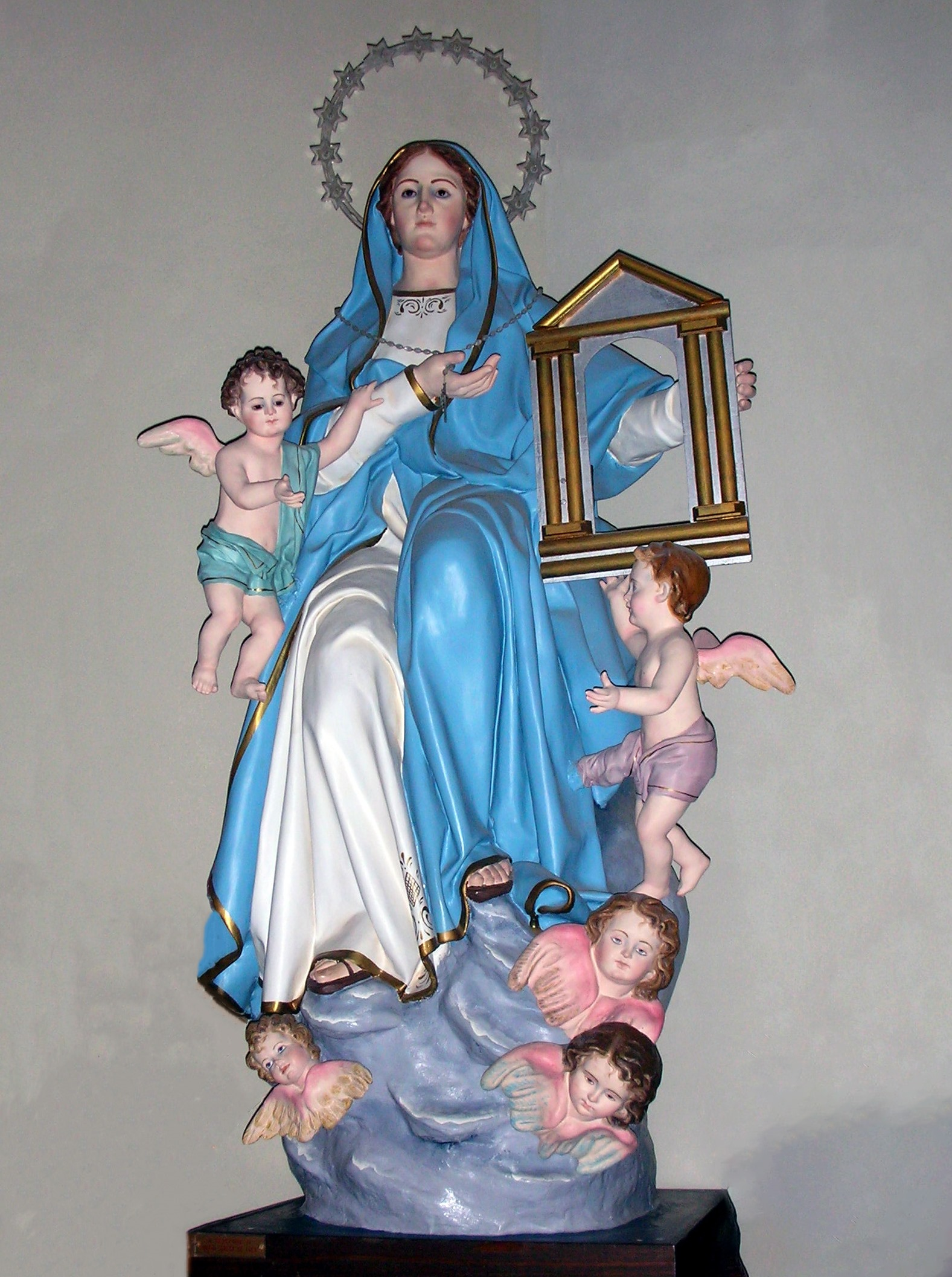 Foto della statua di Santa Maria della Porta